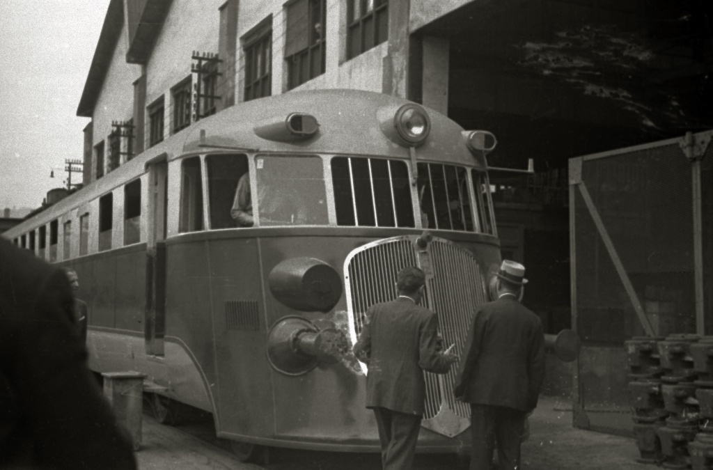 Título original: Autoridades visitando la Compañía y Auxiliar de Ferrocarriles (CAF) de Beasain (23/26) Localización: Beasáin (Guipúzcoa)